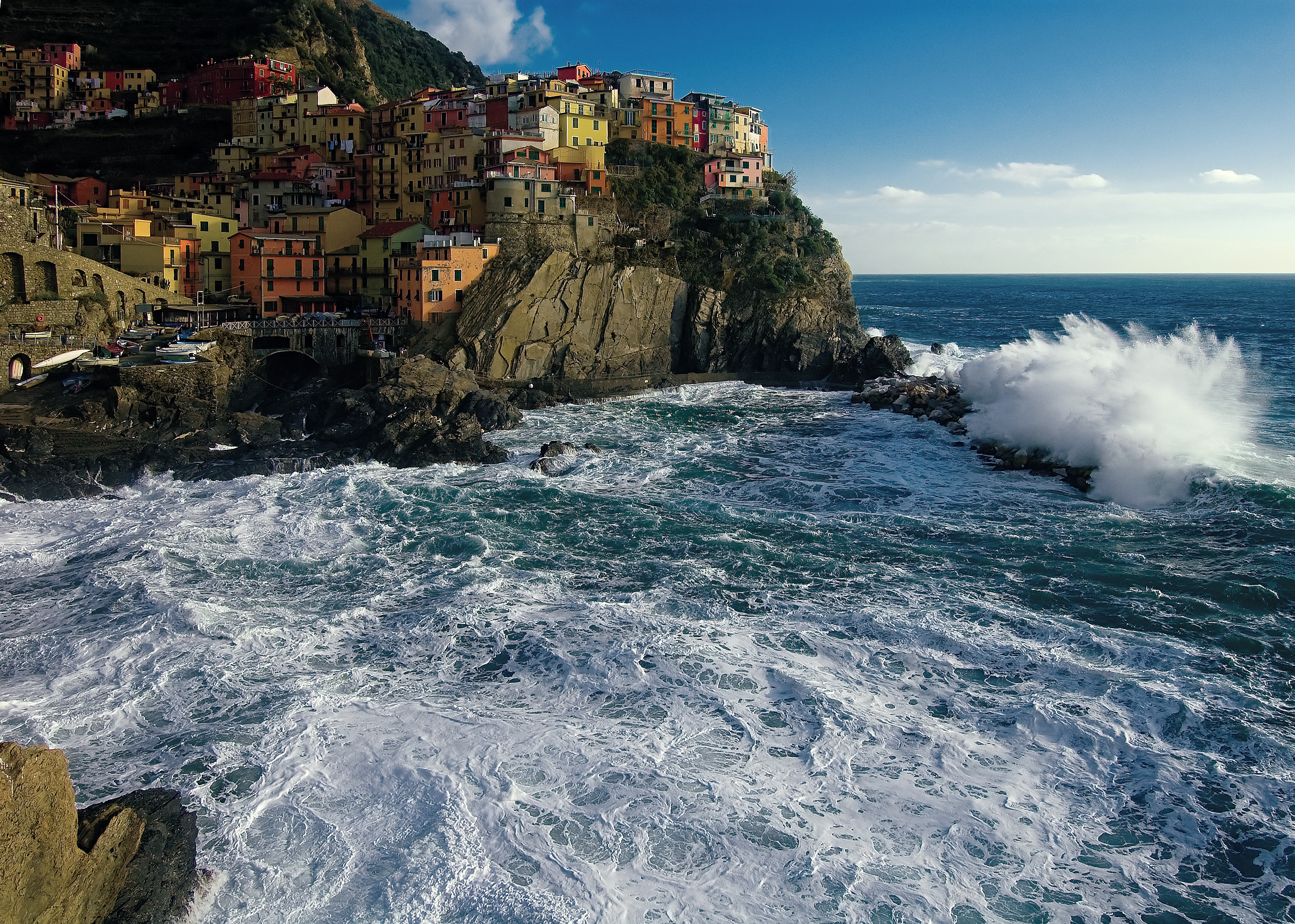 Manarola, Liguria, Italy